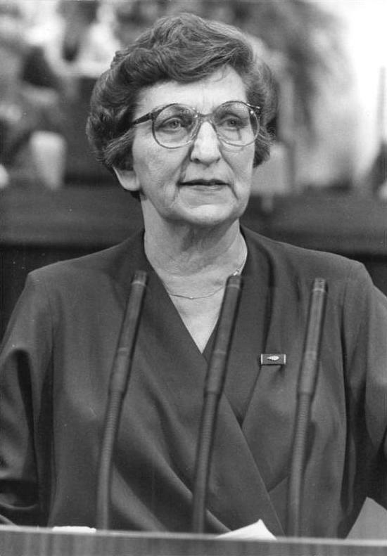 ADN-ZB Mittelstädt 5.3.87-kb Berlin: XII. DFD-Kongreß Die Vorsitzende des DFD, Ilse Thiele, erstattete den Bericht des DFD-Bundesvorstandes an den XII. Bundeskongreß im Palast der Republik.